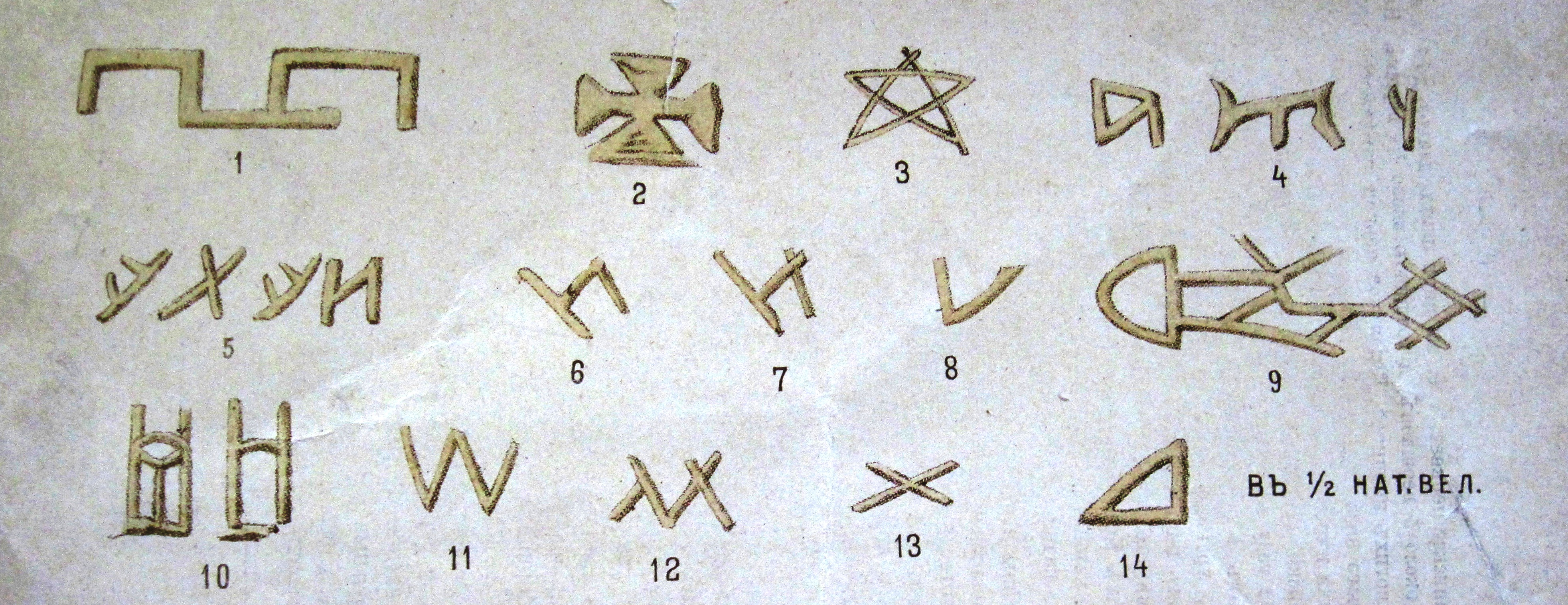 Знакі на плінфе Каложскай царквы ў Гродне